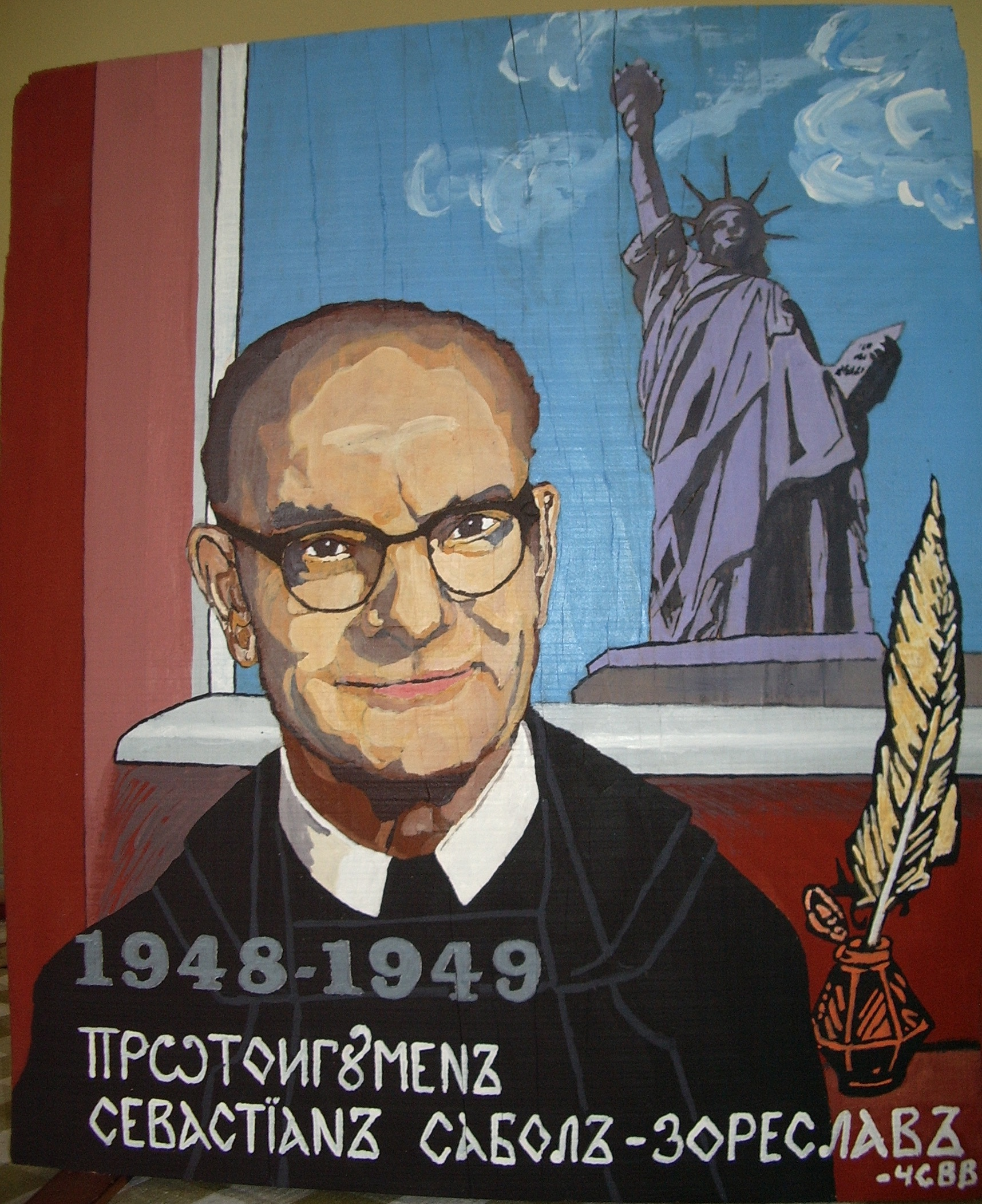 Намалювано на дереві о. Гораздом Тимковичом. Photo taken by Jozafát Vladimír Timkovič, OSBM